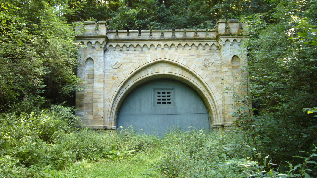 Das Westportal des Friedatunnels in der Nähe von Schloss Wolfsbrunnen bei Schwebda